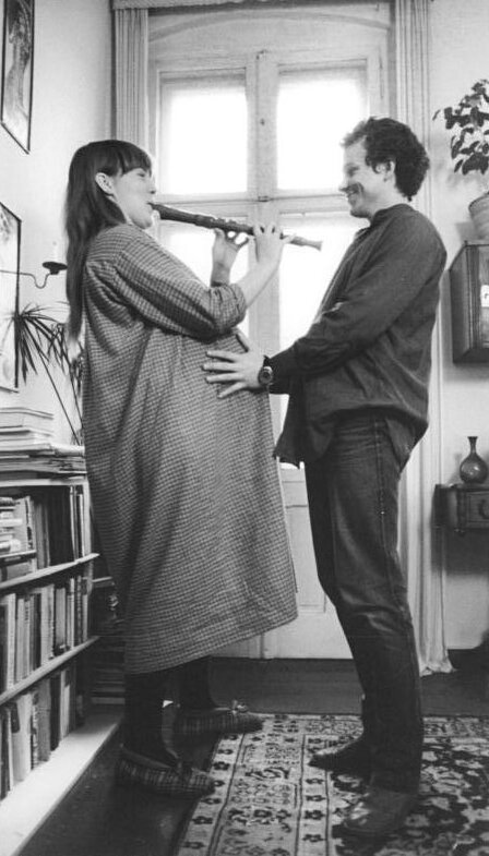 Berlin, Familienszene. ADN-ZB Rehfeld-9.4.85 Berlin: Geburt- Sigrid und Mathhias freuen sich auf ihr erstes Kind.